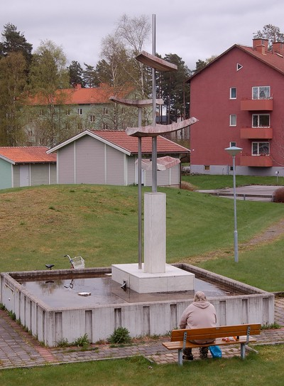 Betong skulpturen Molnets broder utförd av Lennart Kindgren (1926-1993)placerad i bostadsområdet Korea, Laxå, Sweden.